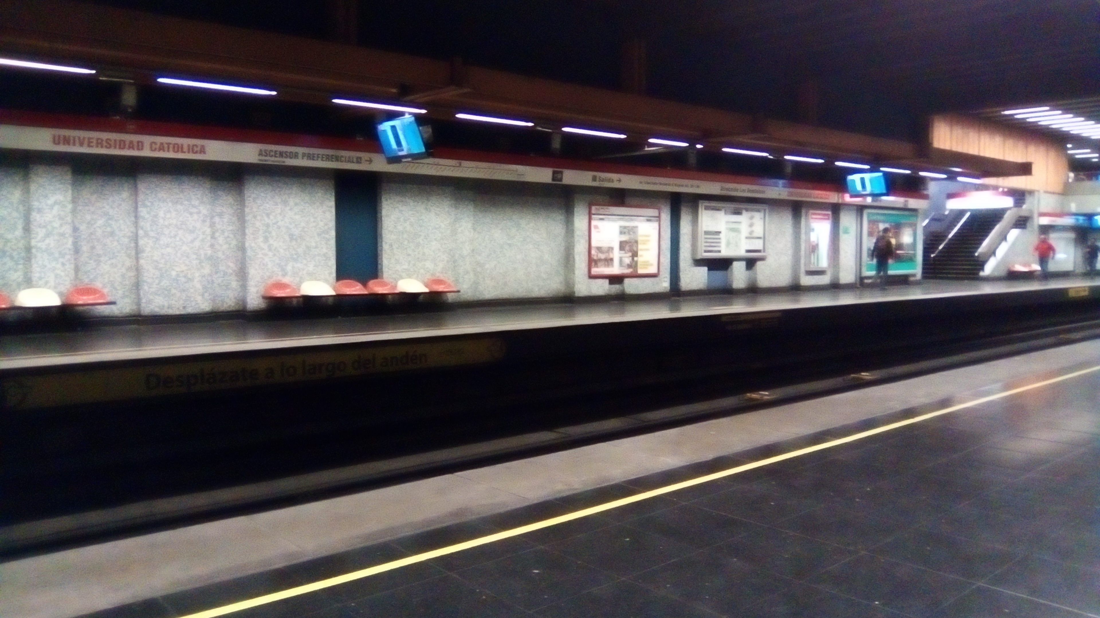 Estación Universidad Católica